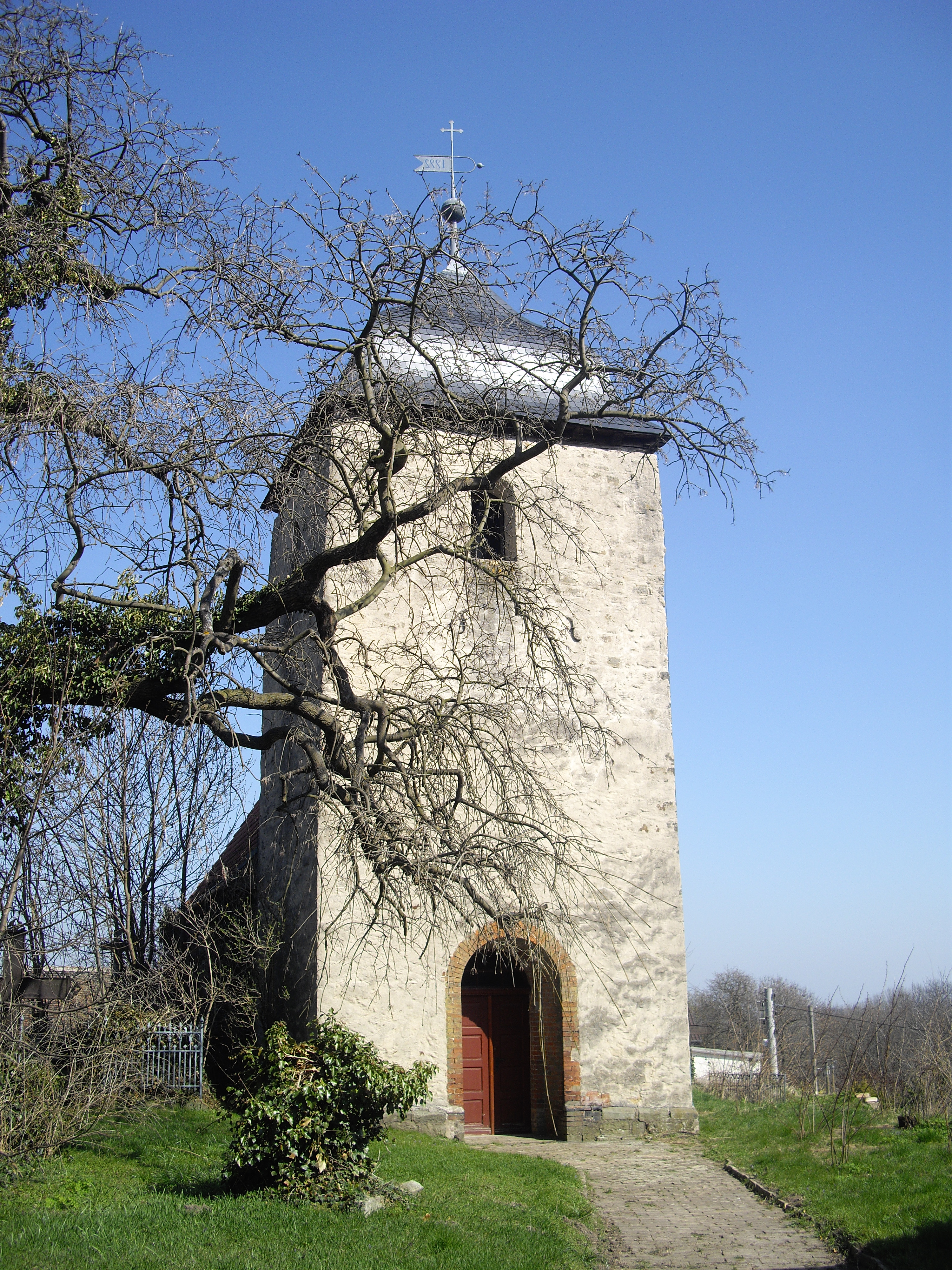 Der Turm der Dorfkirche in Neehausen